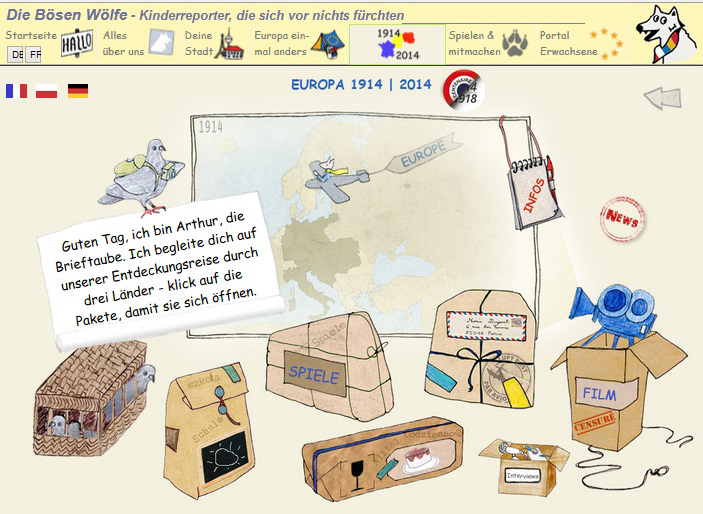 Startseite der trinationalen Webrubrik Europa 1914-1918 zum hundersten Jahrestag des Beginns des Ersten Weltkrieges